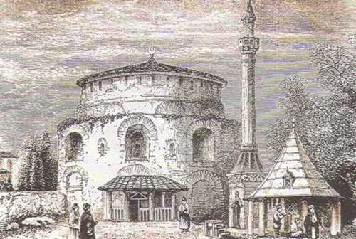 La Rotonde de Galère / Saint-Georges, transformée en mosquée, à Thessalonique.